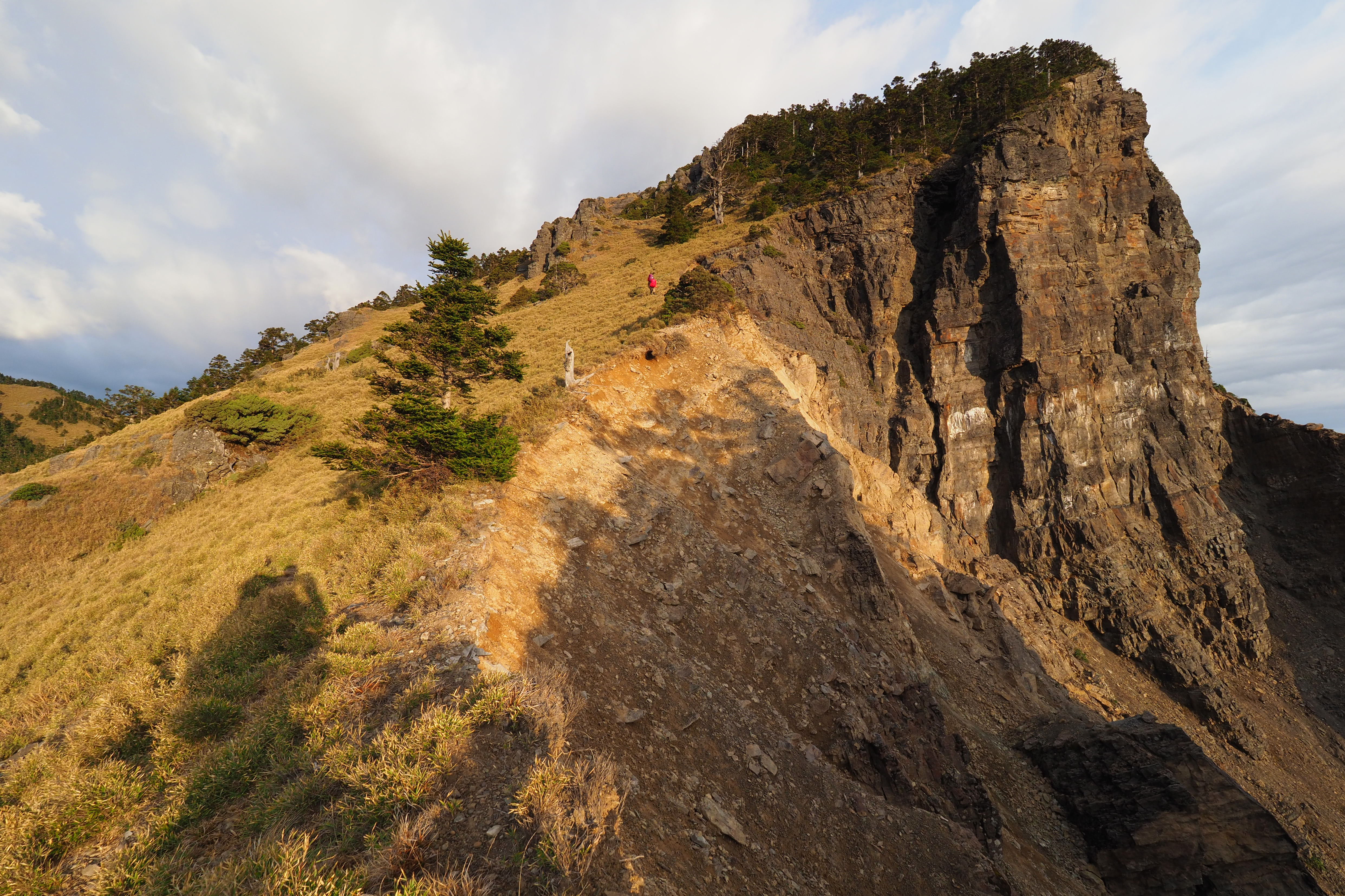 中文（台灣）: Mt.TouYing 頭鷹山